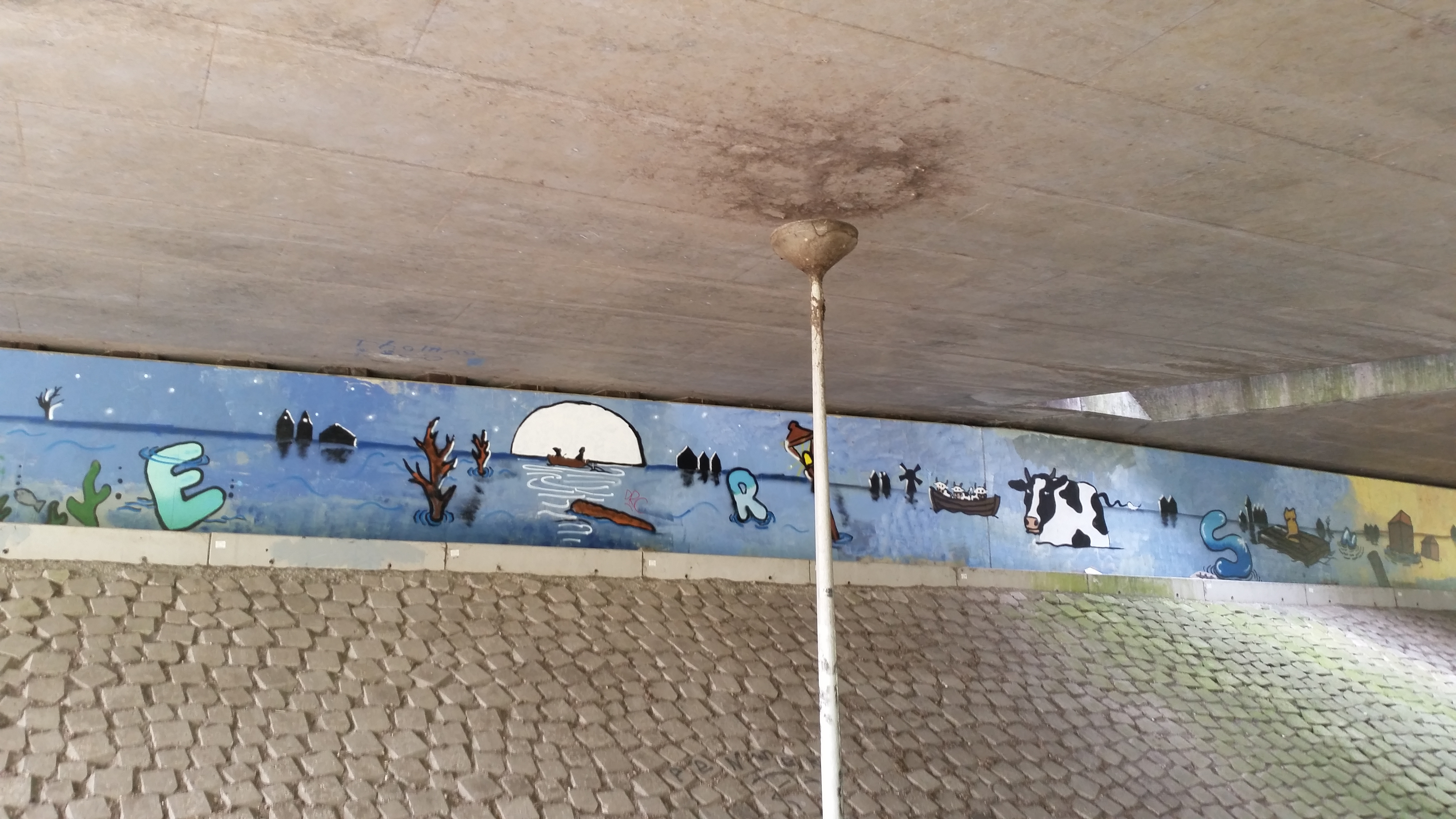 Muurschildering Schellingwouderdijkbrug